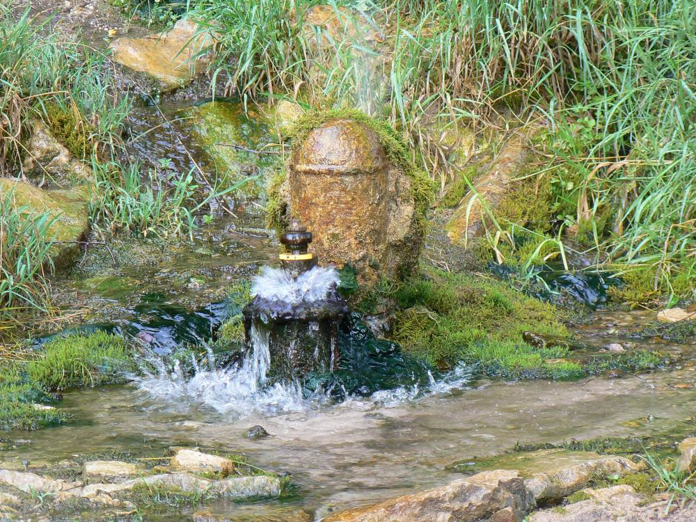 Vesioinas